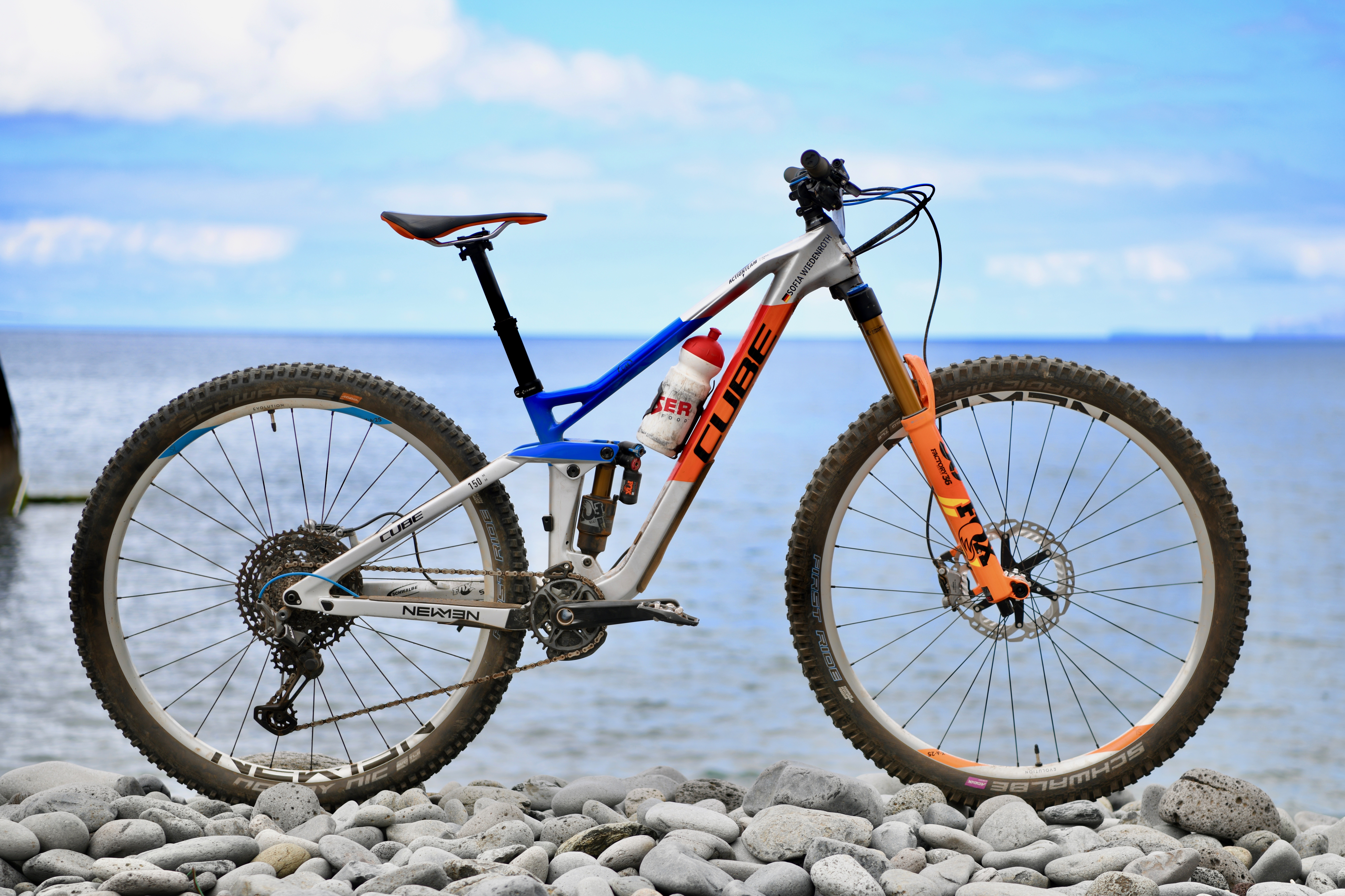 Stereo 150 Actionteam